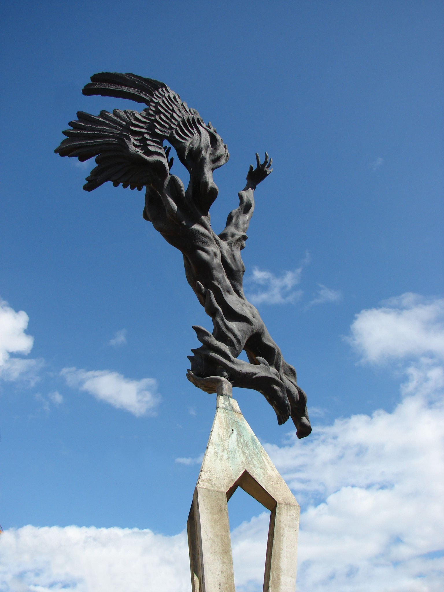 Monumento a Porfirio Barba Jacob obra del maestro Rodrigo Arenas Betancur, bronce y concreto, 5.50 m de alto. Parque central del Municipio de Santa Rosa de Osos. Antioquia, Colombia.